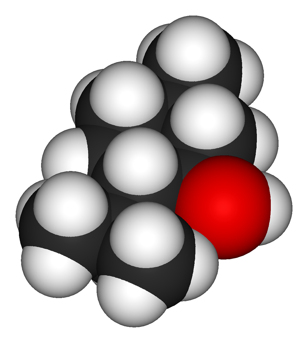 (-)-menthol-3D-vdW